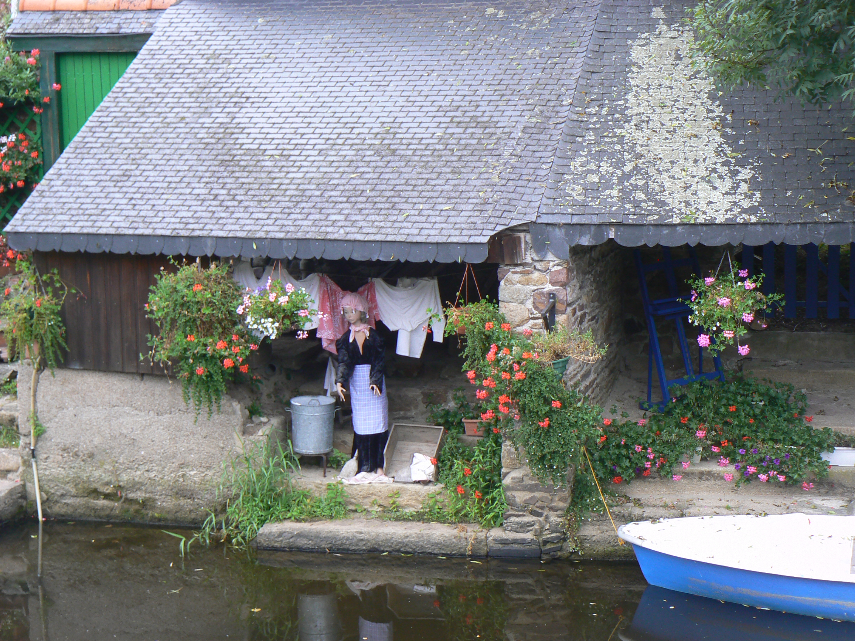 Lavoir reconstitué à Pontrieux